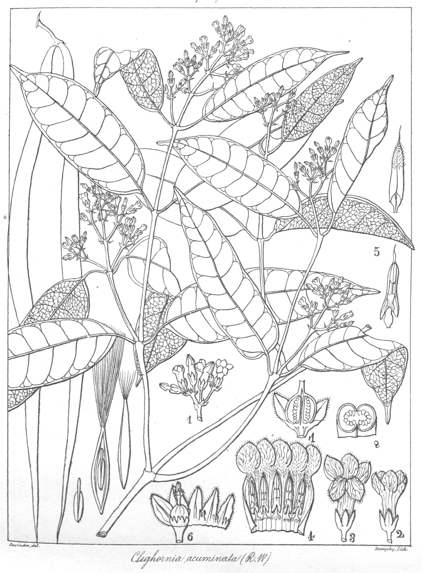 Cleghornia acuminata, Apocynaceae